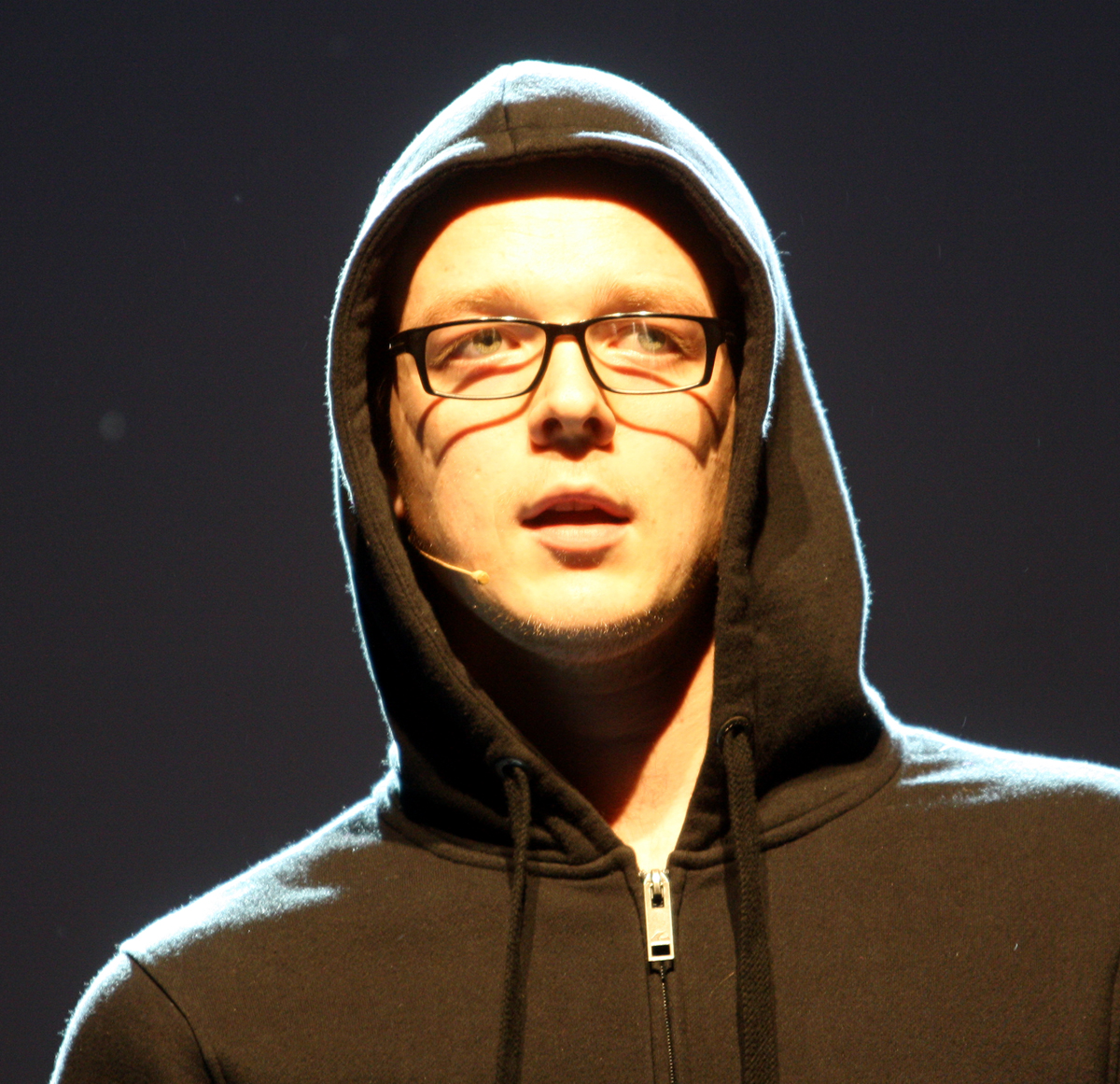 Niko Semsrott